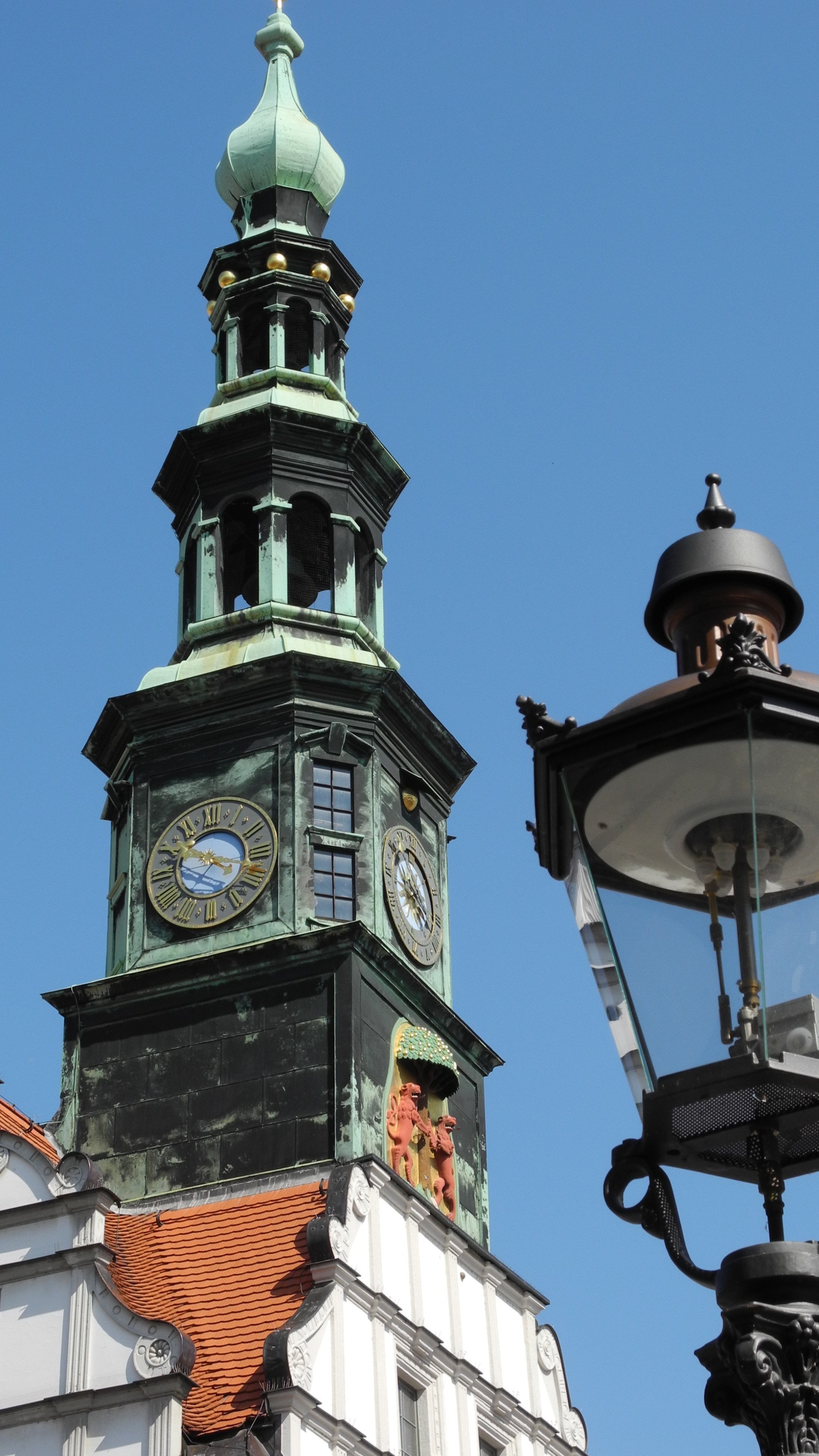 Pirna - Rathausturm